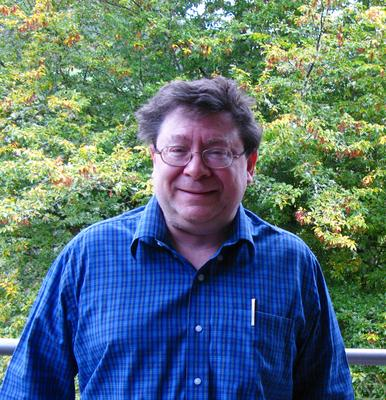 Foto di Harvey Friedman